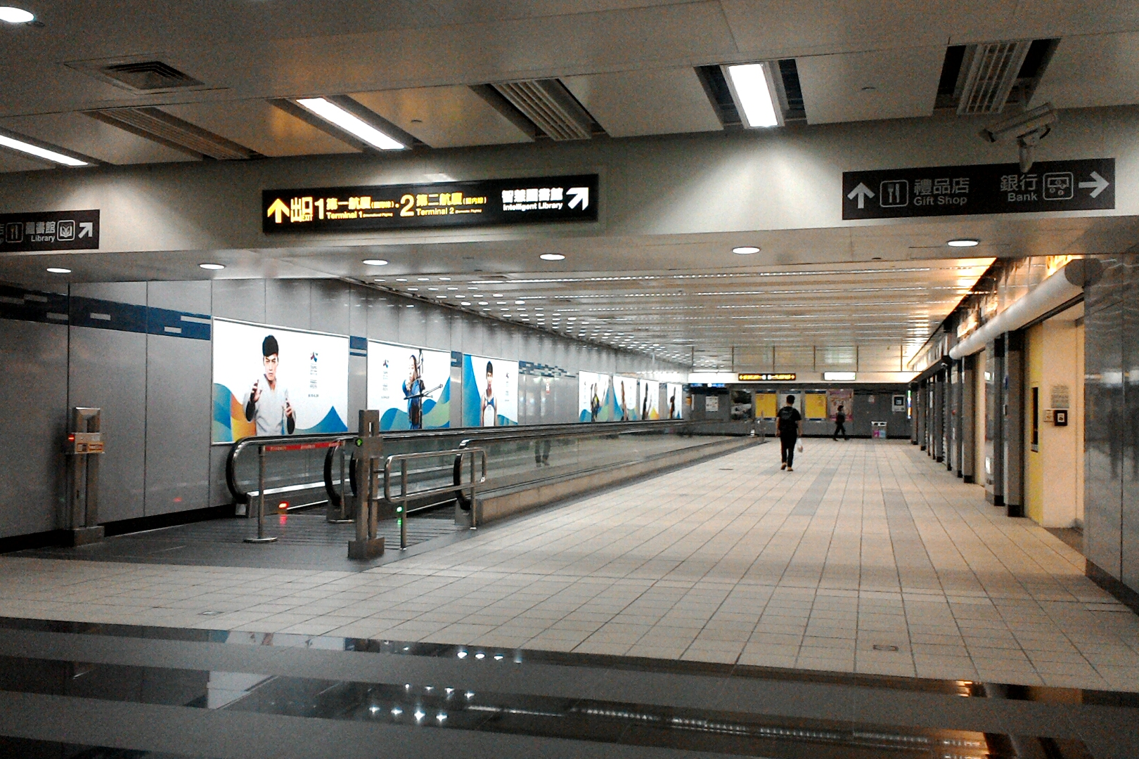 捷運松山機場站通道層,台北市松山區東社次分區精忠里